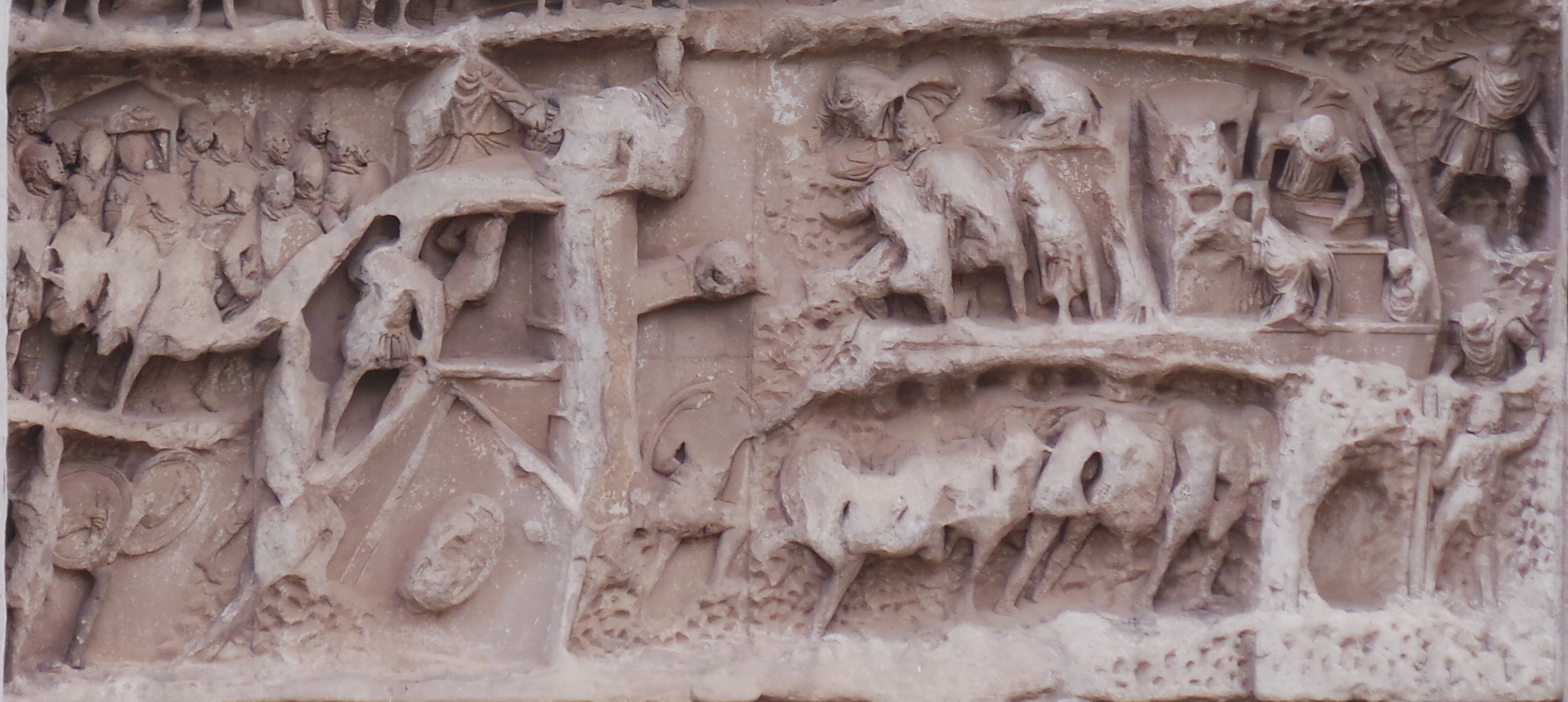 Einsatz eines Rammbocks bei der Einnahme der Stadt Seleukia-Ktesiphon